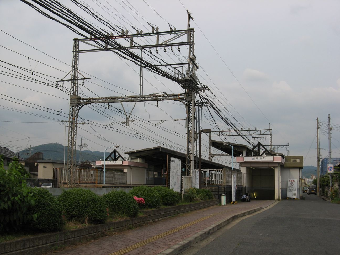 近鉄ja:大福駅